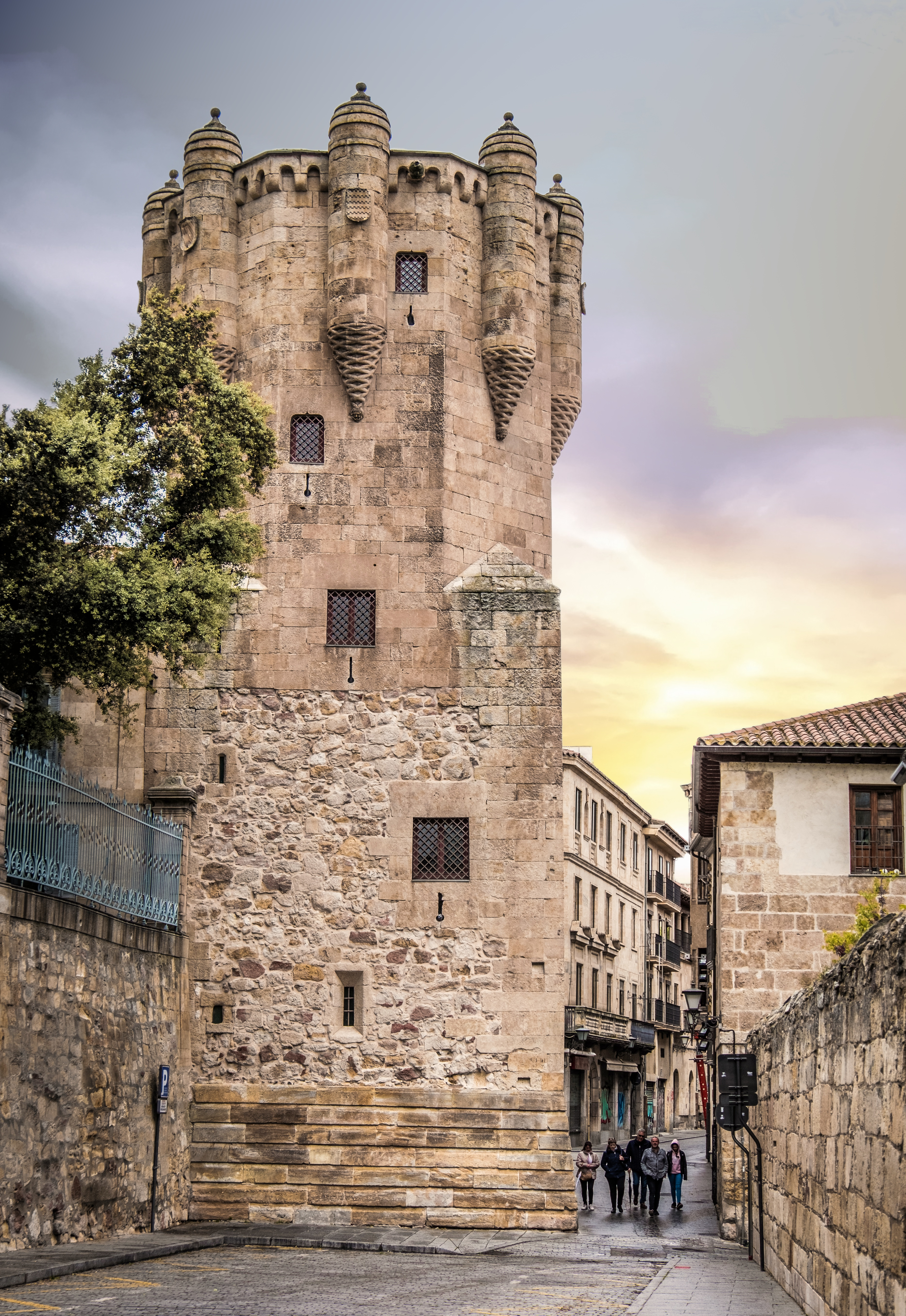 Resto de la casa señorial del clavero de la Orden de Alcántara. Los claveros eran los caballeros a cuyo cargo estaba la custodia y defensa del principal castillo o convento.